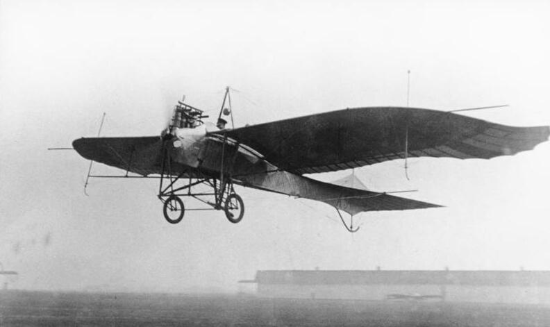 Rumpler-Taube ("A.54.") nach dem Start auf dem Flughafen Köln-Longerich der Fliegertruppe, 1913/14